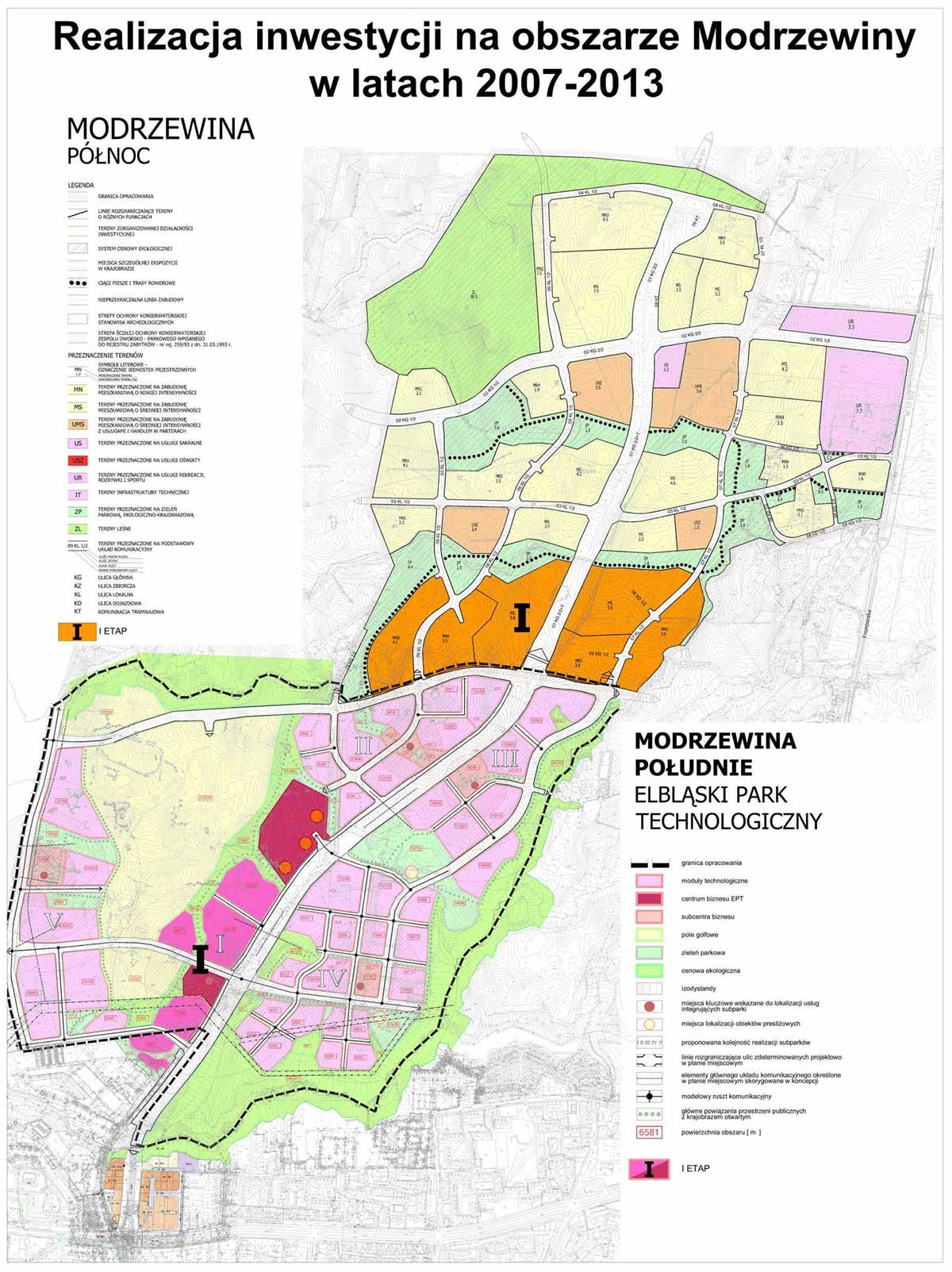 Realizacja inwestycji na obszarze Modrzewiny w latach 2007-2013